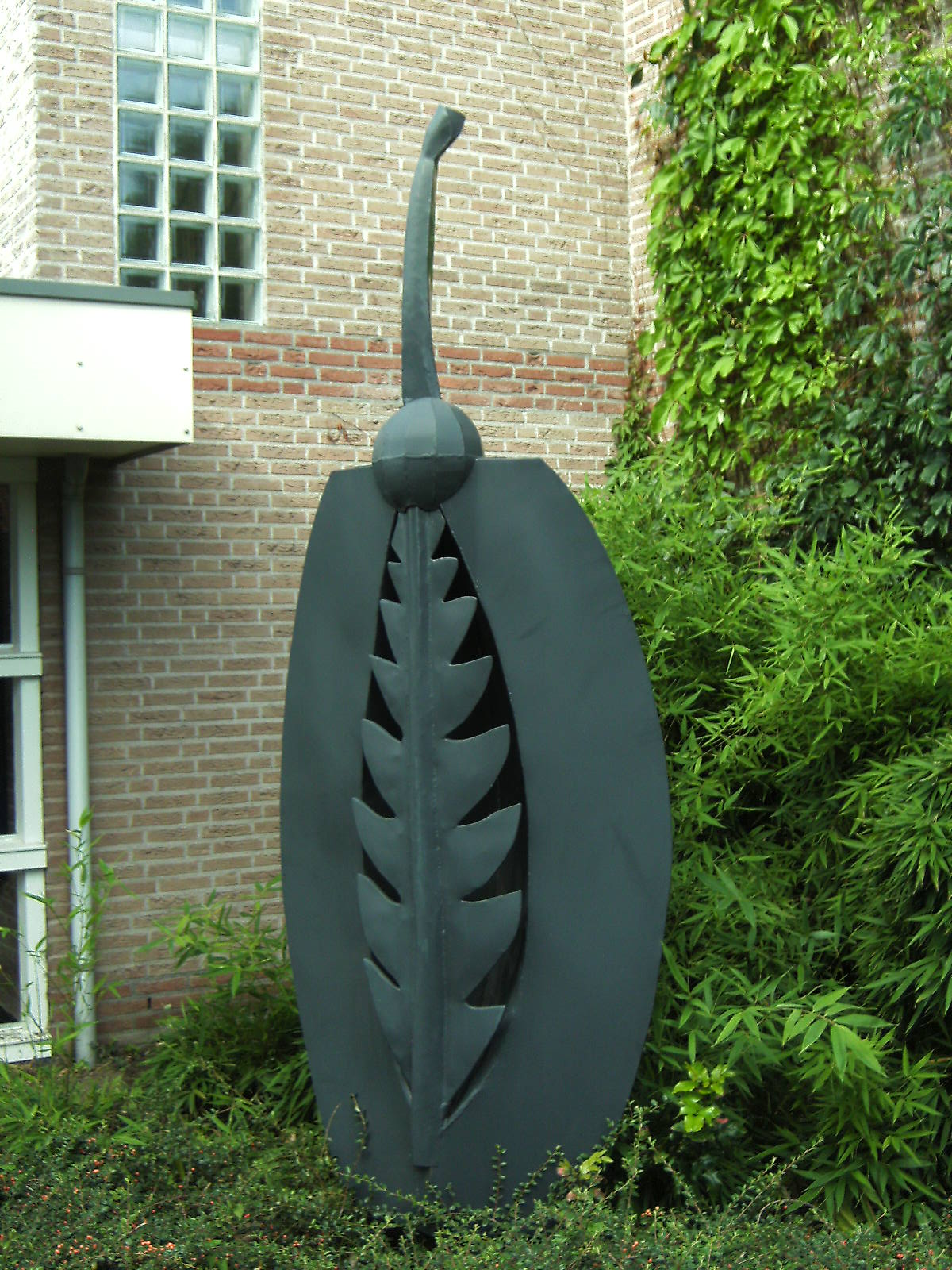 De appel, een kunstwerk uit 1998 van Mirjan Koldewij bestaande uit drie gelijkaardige sculpturen geplaatst bij kort bij elkaar gelegen toegangen tot een appartementencomplex aan de Vreeswijkstraat te Winterswijk